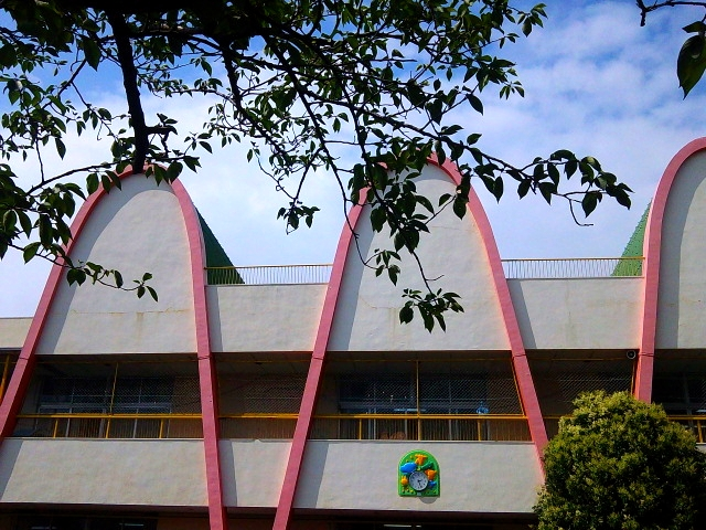 加藤学園幼稚園の2011年夏までの園舎